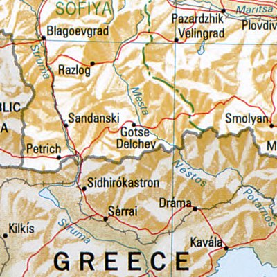 Goze Deltschew - Lage der Stadt in Bulgarien